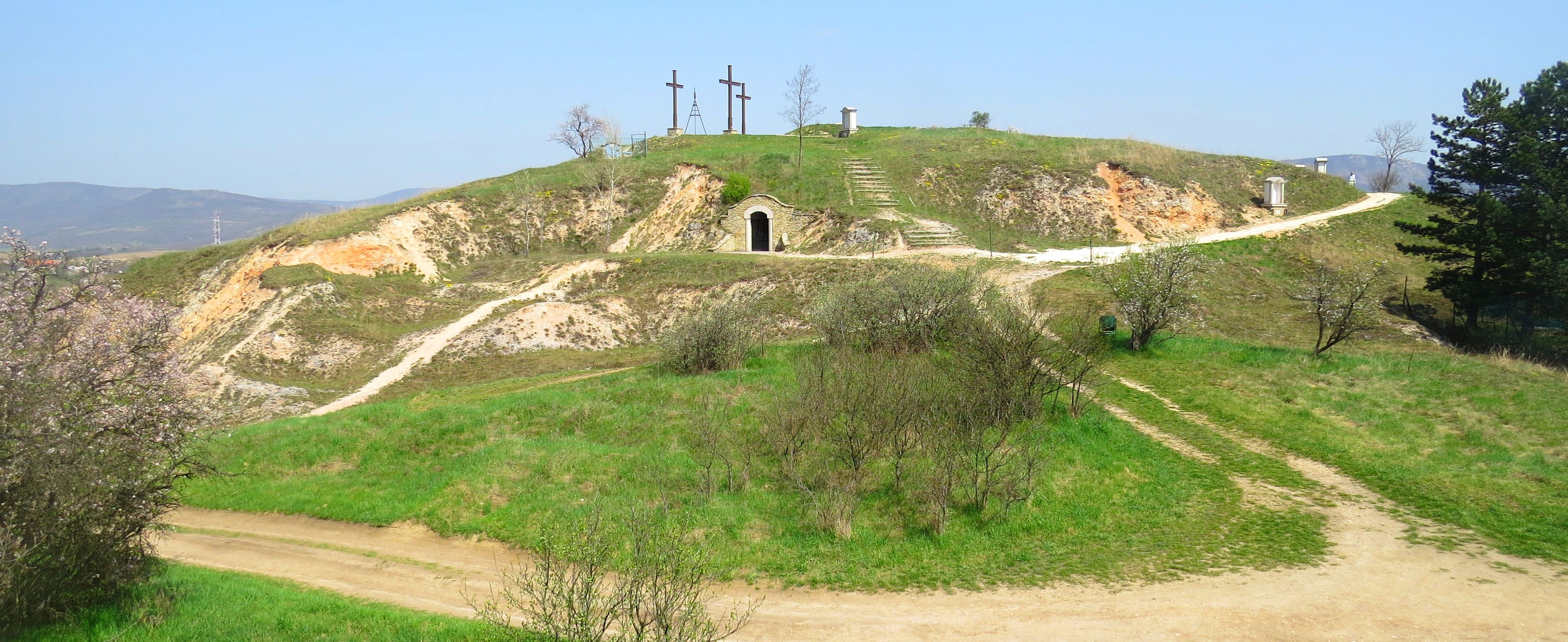 A solymári Szél-hegyen az 1990-es években a településen létrehozott Golgota Alapítvány új keresztutat létesített, a község korábbi, nagyrészt elpusztult kálváriája helyett. A helyet 1999-ben szentelték fel.